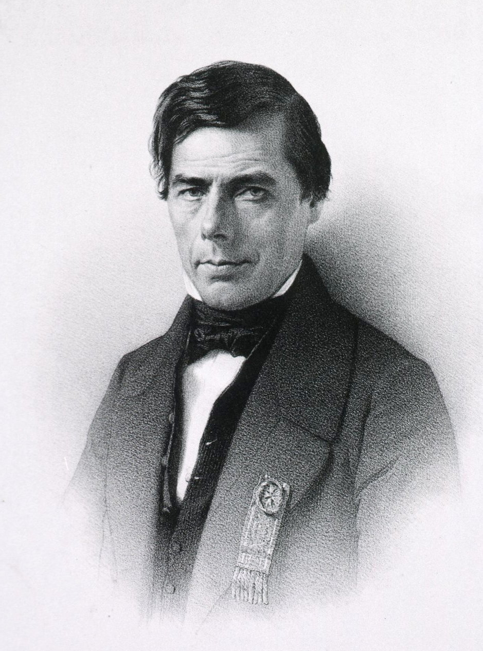 Ulysse Trélat (1795-1879)